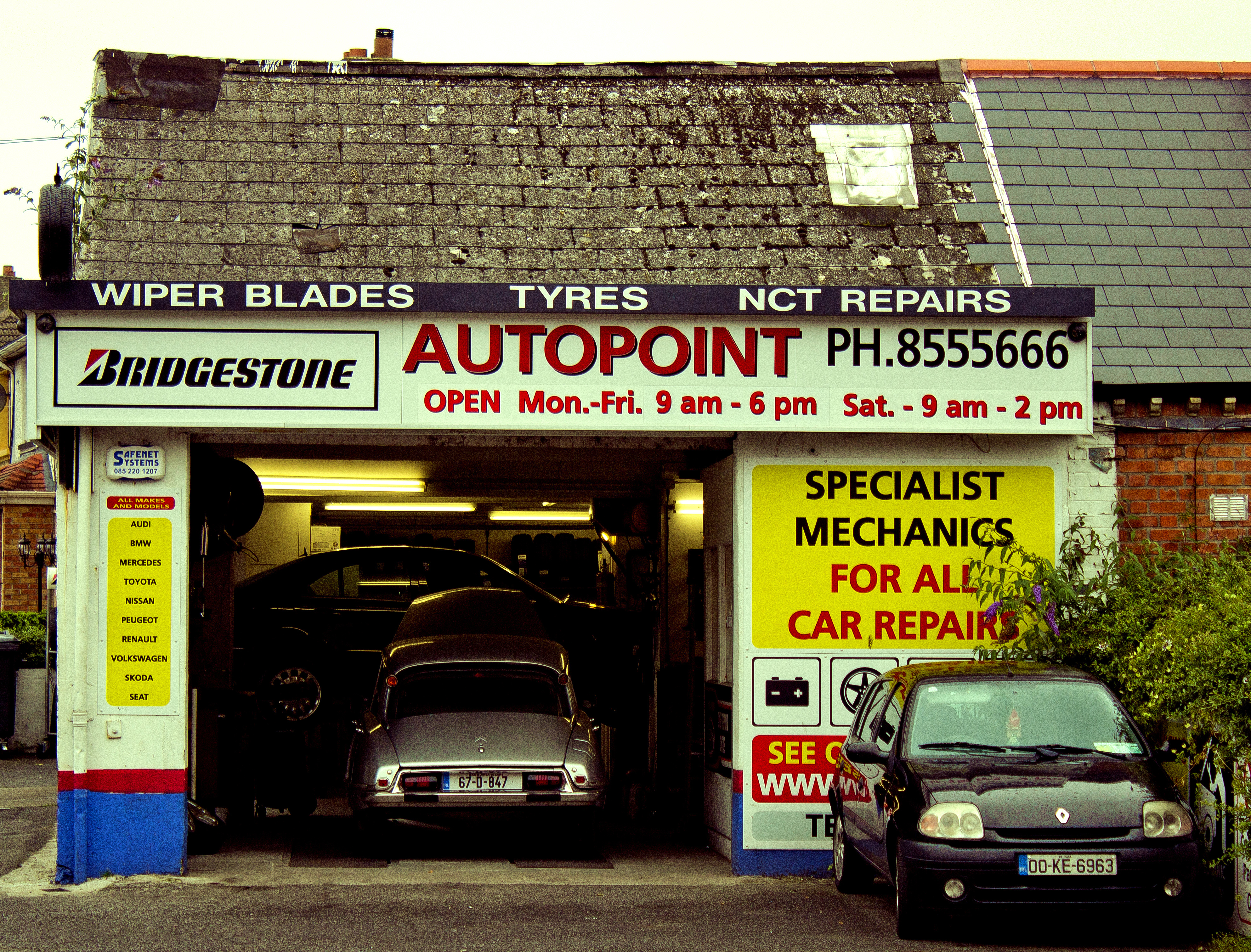 AUTOPOINT